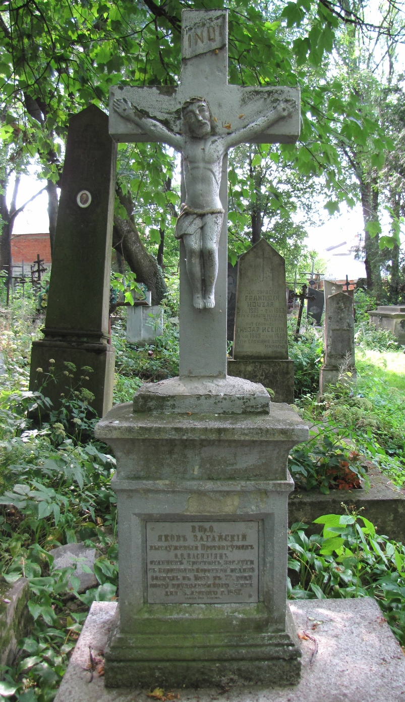 Надгробок на могилі о. Якова Загайського, ЧСВВ станом на 27 червня 2012 (Дрогобицький цвинтар по вул. Трускавецькій)